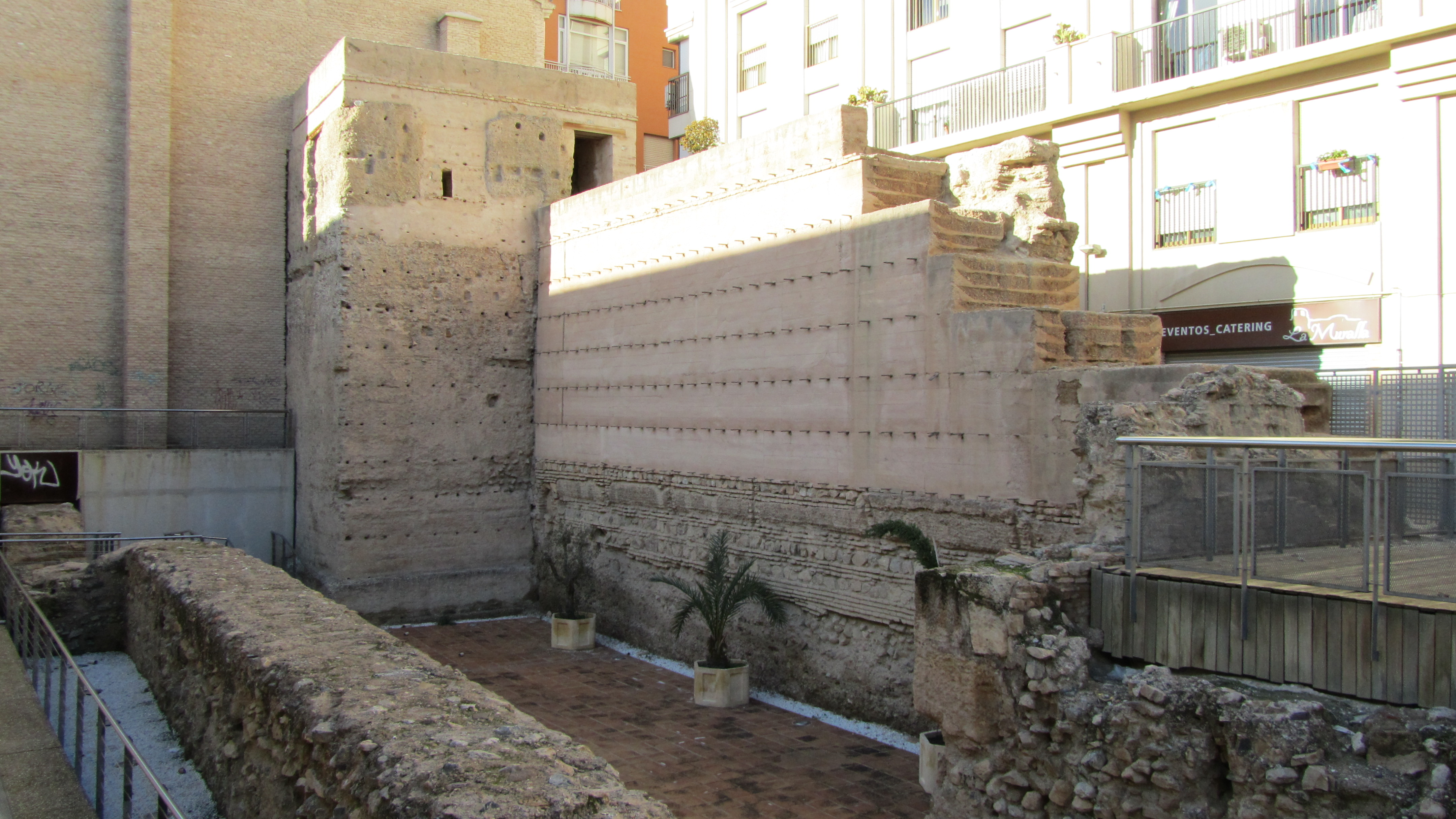 Muralla árabe de Murcia. Muralla de Verónicas. Siglo XII